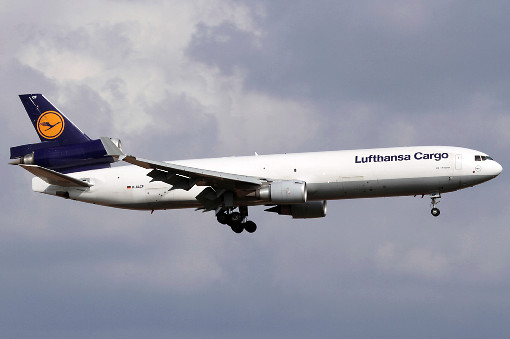 D-ALCF